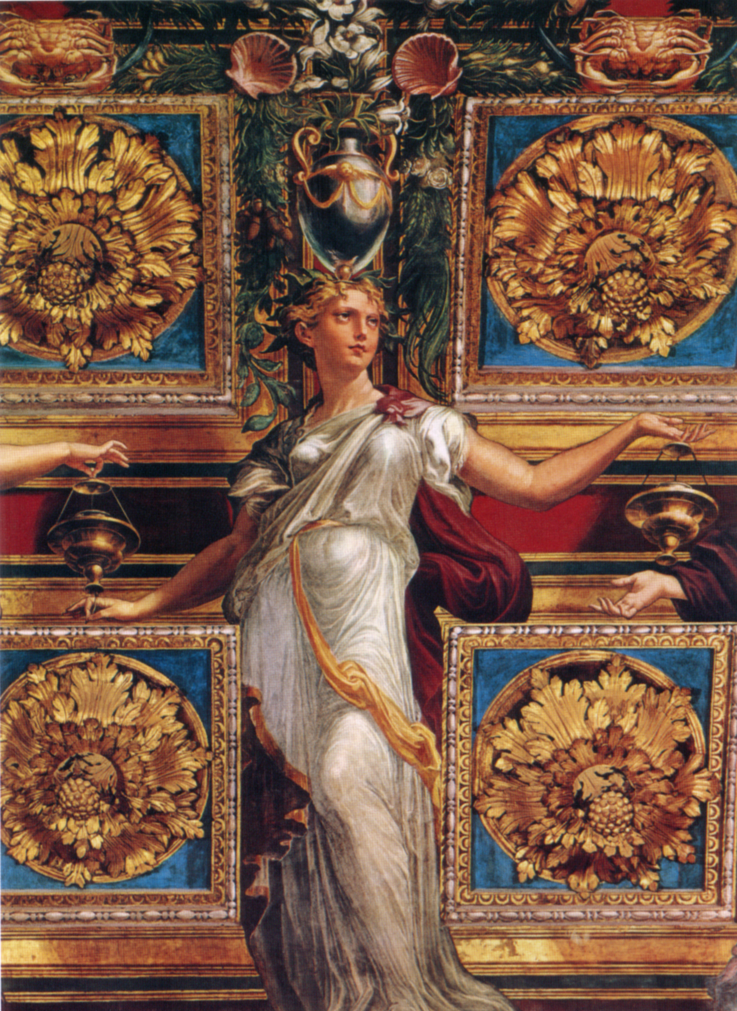 detail